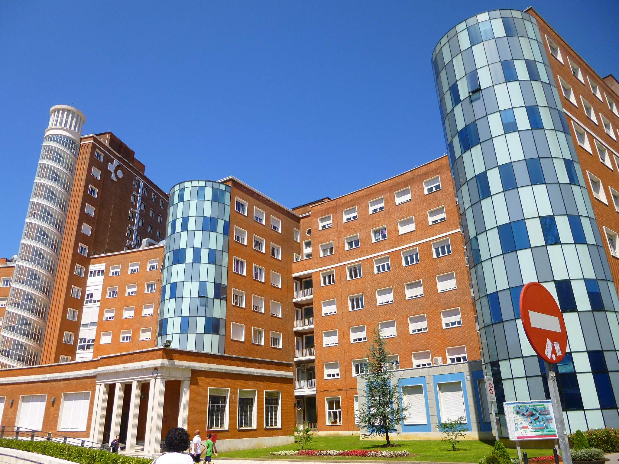 Hospital de Cruces-Gurutzetako Hospitalea, en Barakaldo (Bizkaia)